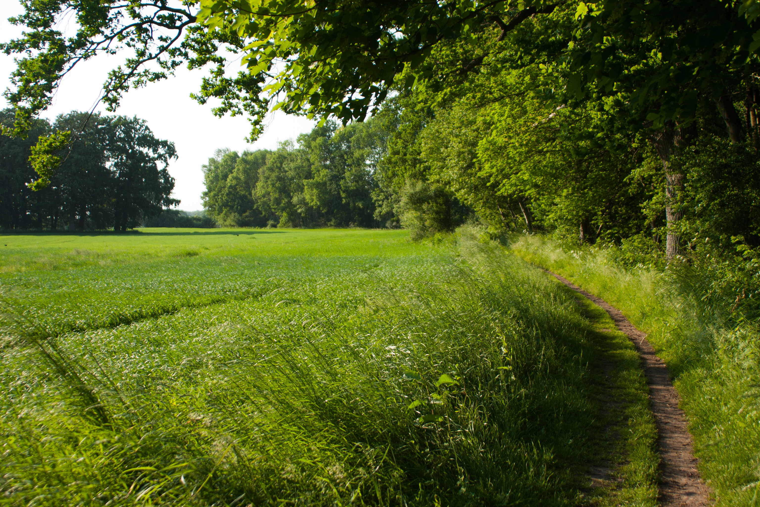 Wanderweg am Windebyer Noor Blickrichtung Norden